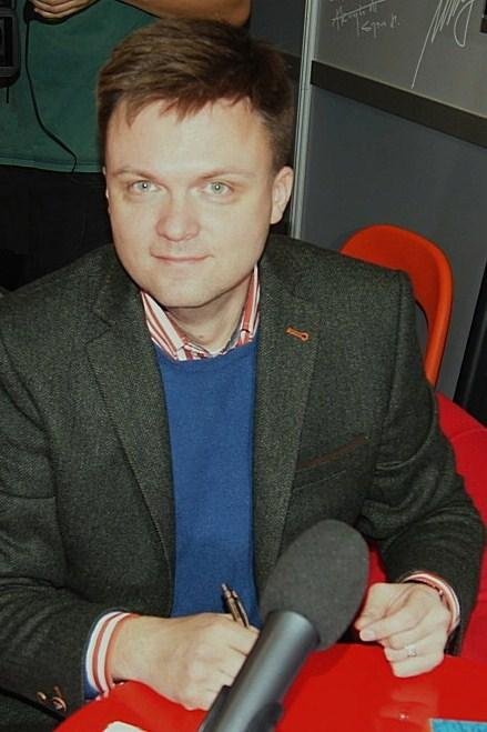 Szymon Hołownia, dziennikarz.